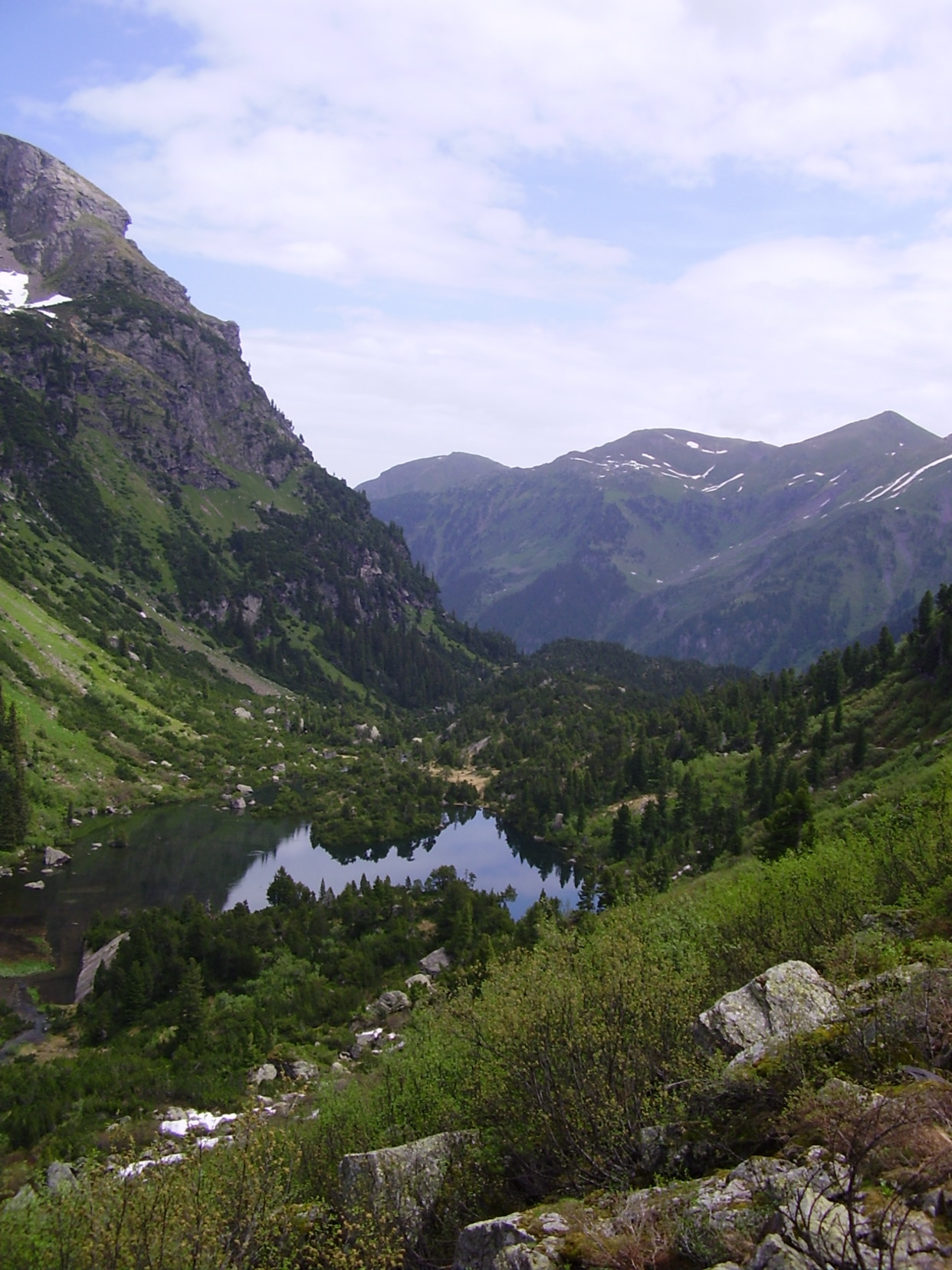 Murgtal mit teilweiser sicht auf den Unteren Murgsee